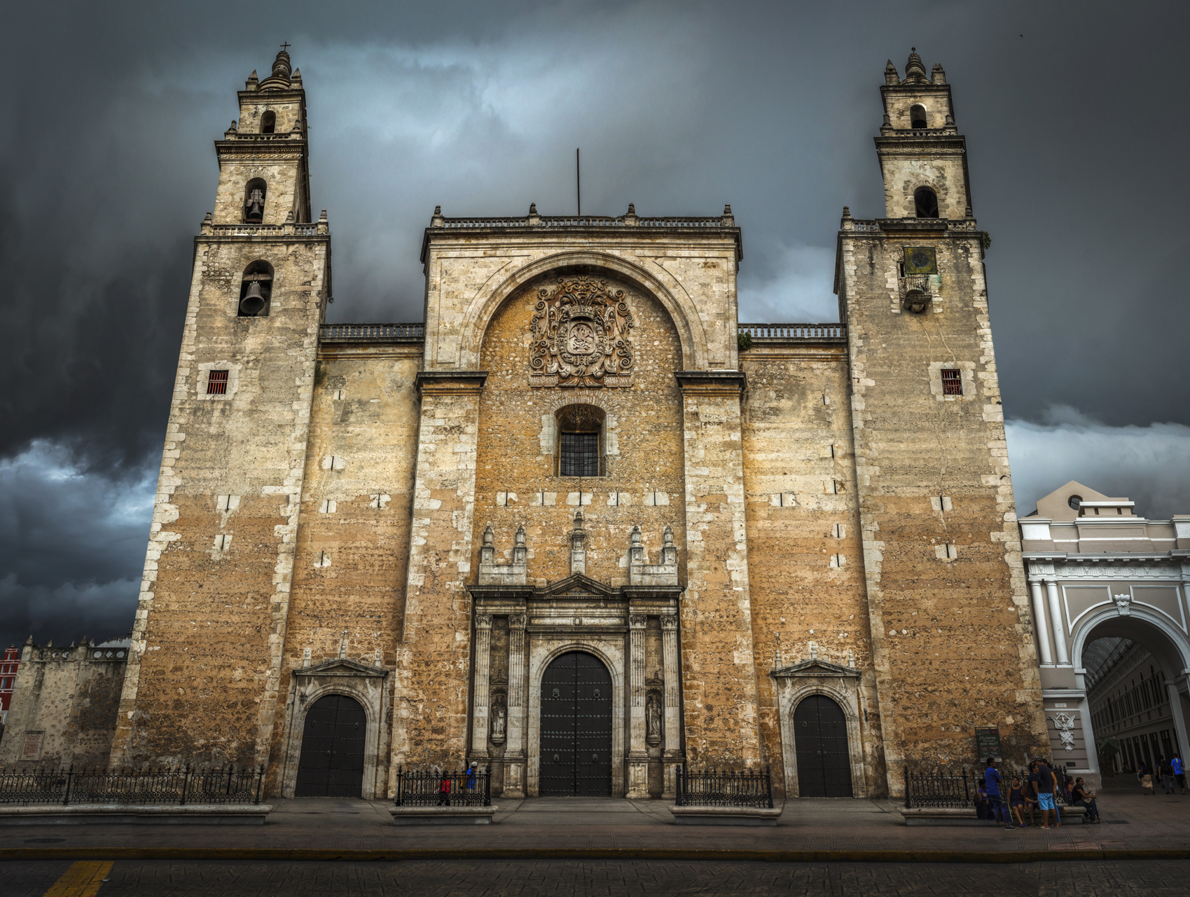 San Ildefonso, Catedral de Mérida, Yucatán, México